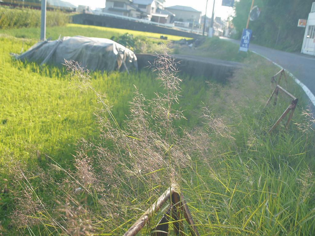 Capillipedium parviflorum ヒメアブラススキ 日本・和歌山県・田辺市 2008.11.1撮影